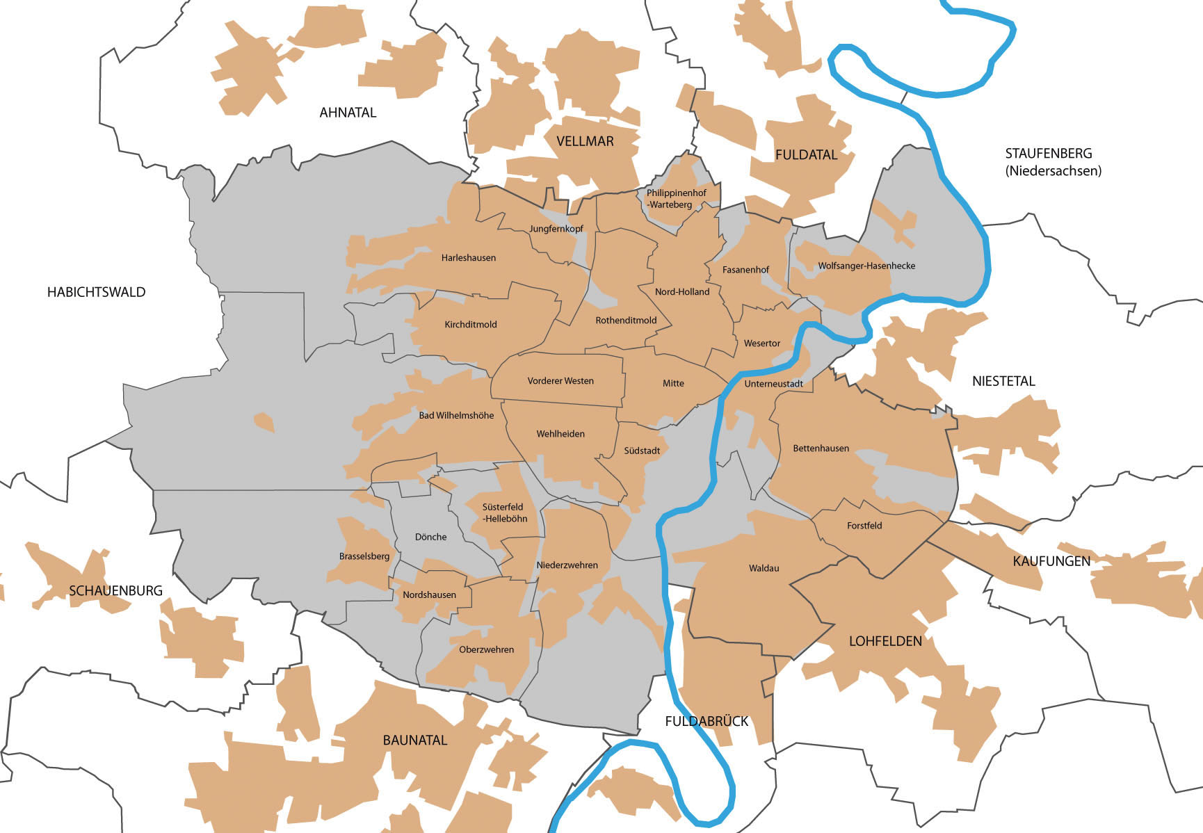 Kasseler Stadtteile und angrenzende Gemeinden